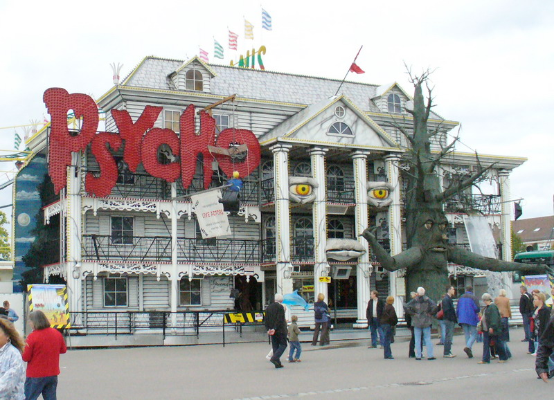 Cannstatter Volksfest Psycho-Laufgeschäft